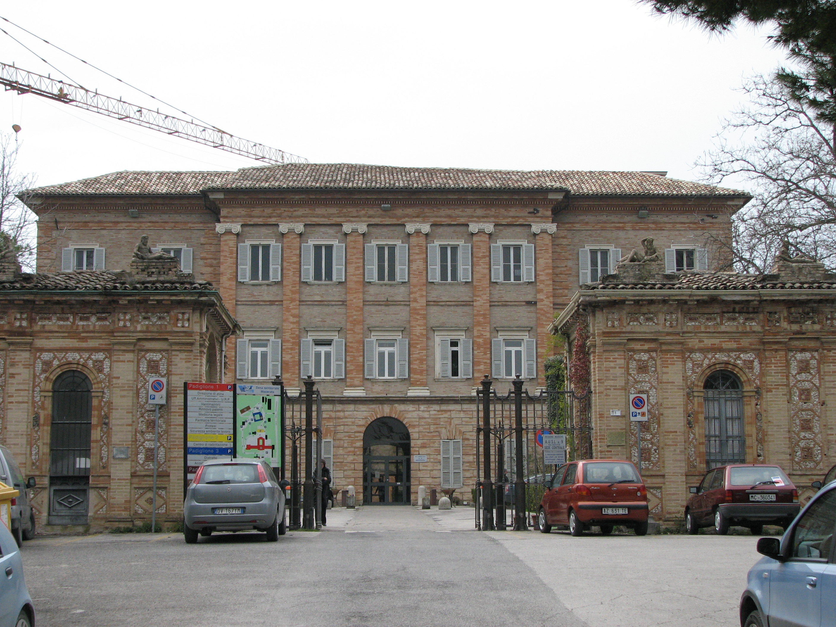 Ex ospedale neuropsichiatrico in Macerata (costruzione 1871)